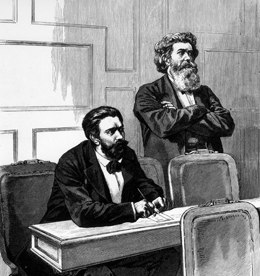 August Bebel (1840-1913) und Friedrich Wilhelm Fritzsche (1825-1905) als Reichstagsabgeordnete während der Rede von Otto von Bismarck zum Sozialistengesetz. Holzschnitt nach einer Zeichnung von Georg Koch